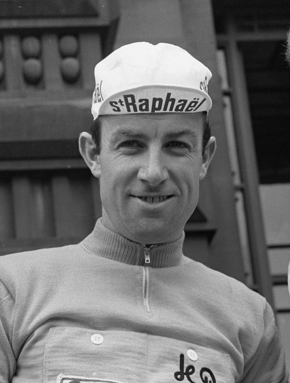 Seamus Elliott avant le départ de la 4e étape du Tour de France 1963 à Roubaix.